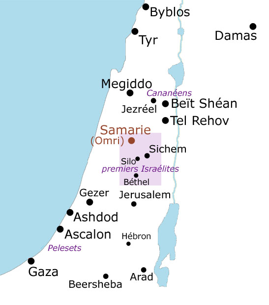 Carte des populations Pelesets Cananéens Israélites